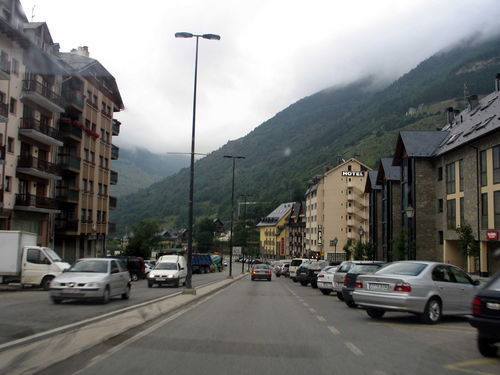 Vielha